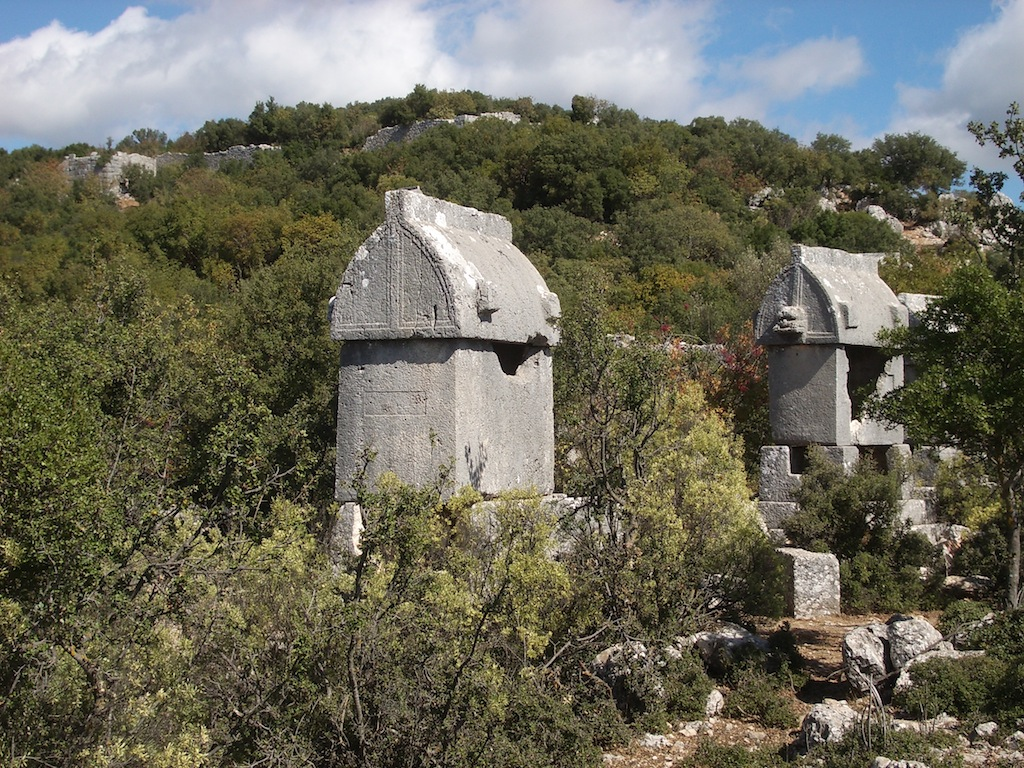 Westnekropole und Akropolis von Kyaenai, Lykien, Türkei